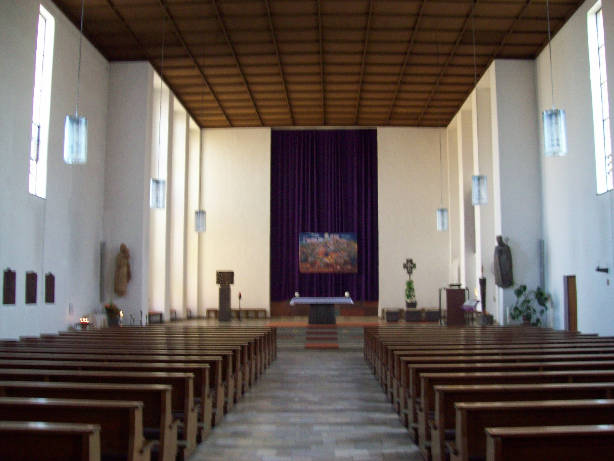 St. Kilian Aschaffenburg-Nilkheim - Innenansicht